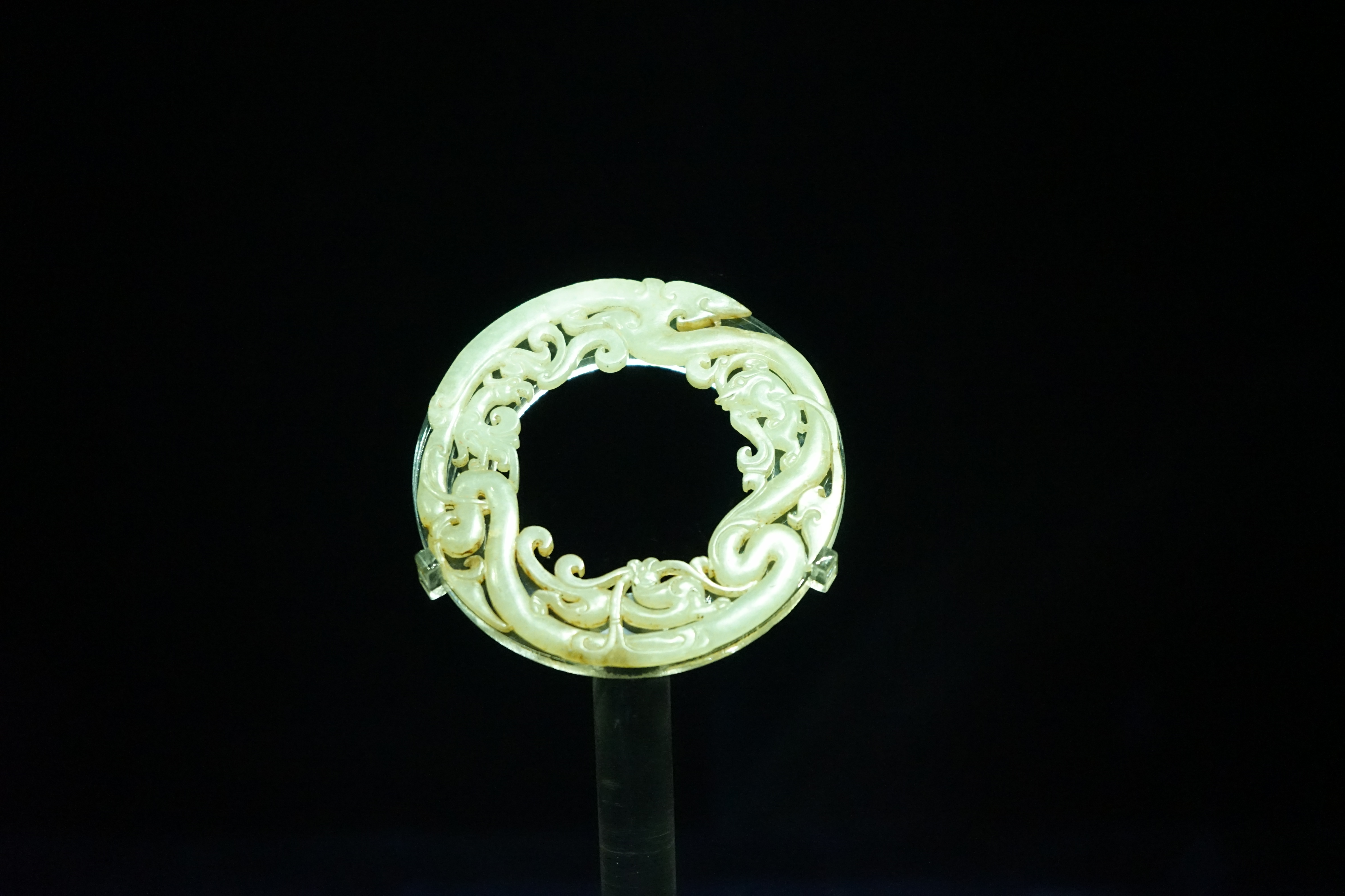 龙凤貘纹玉环 西汉 东洞山楚王后墓出土